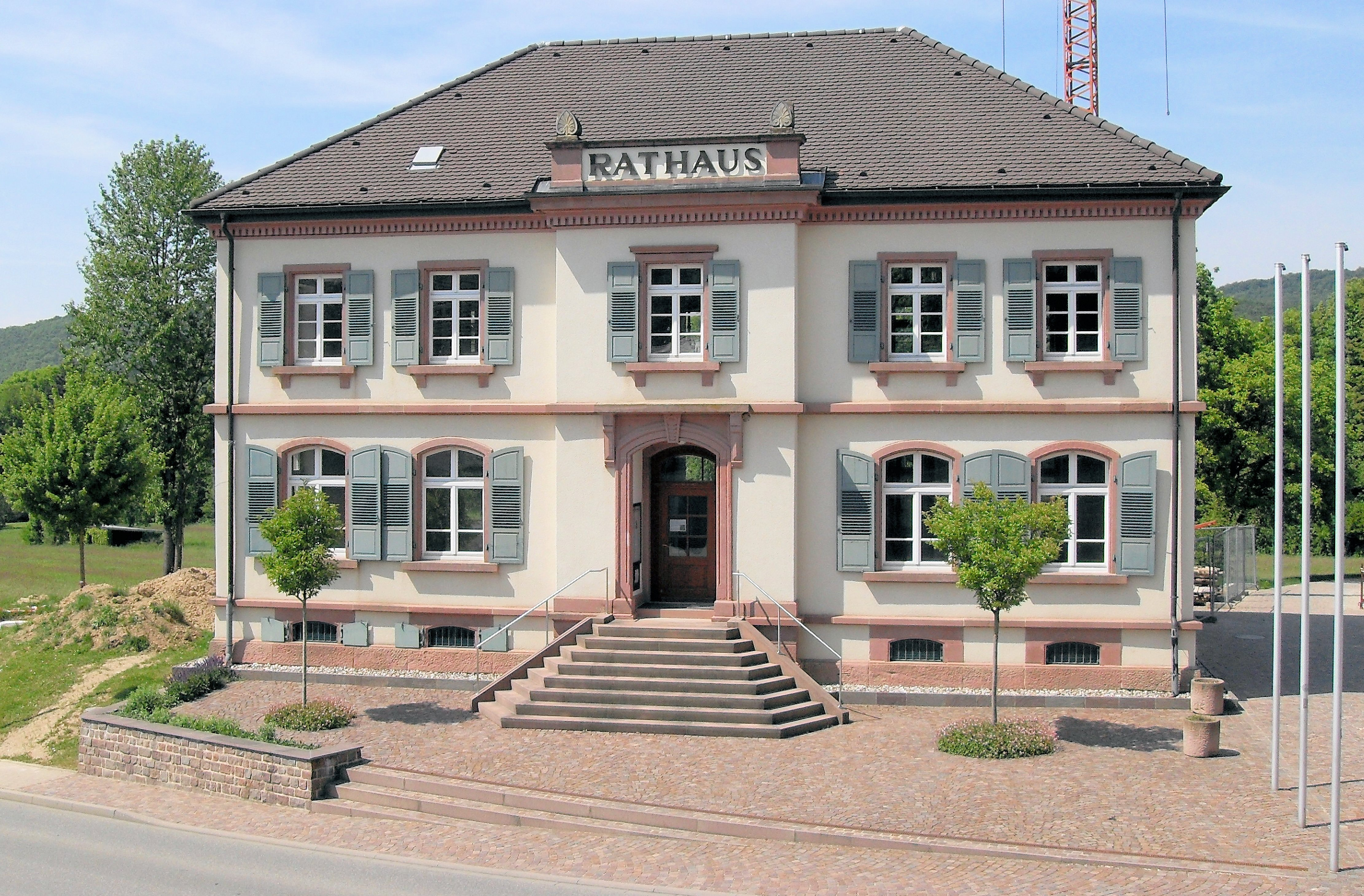 Rathaus in Bollschweil